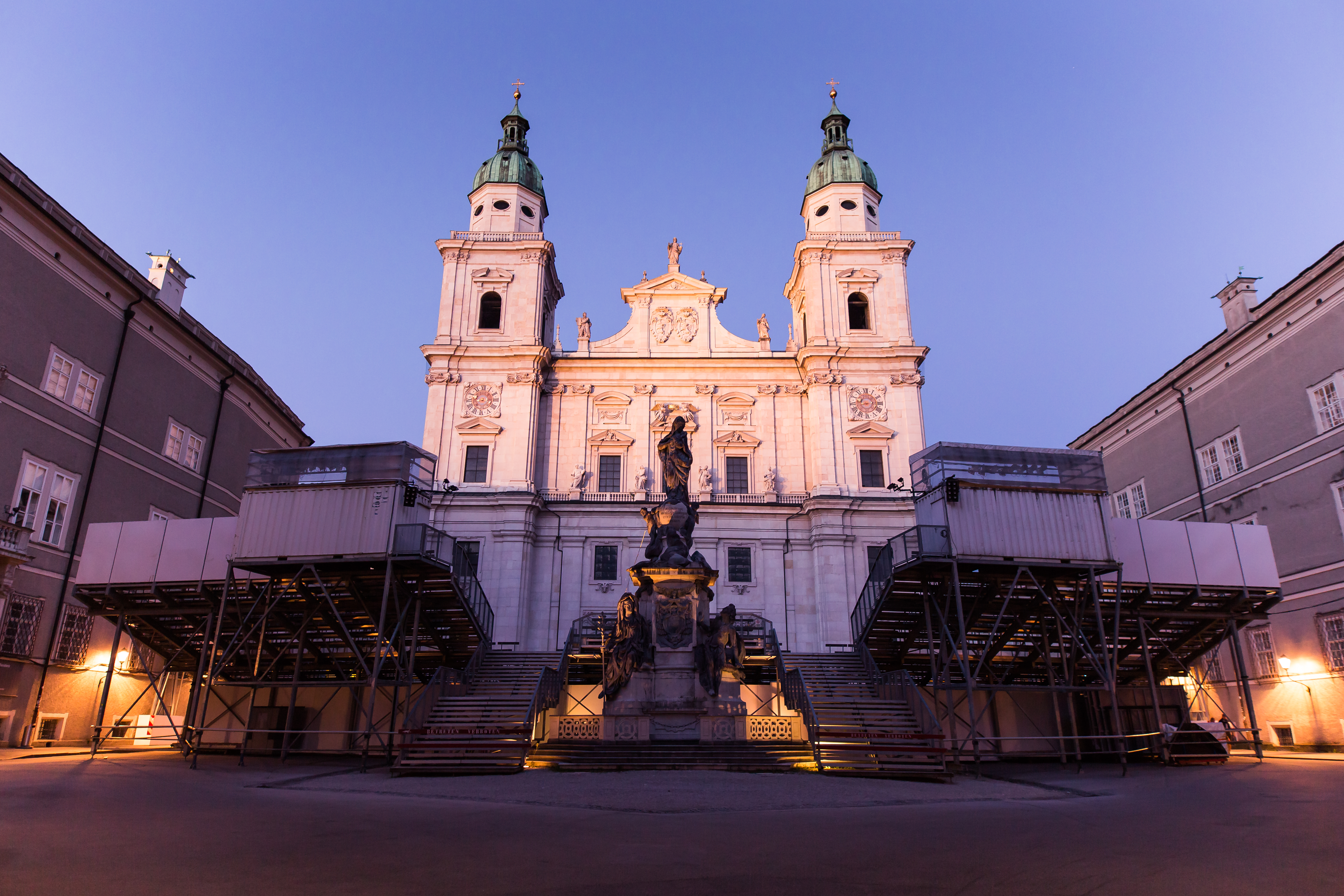 Salzburger Dom; im Vordergrund: die Zuschauertribüne zum "Jedermann"